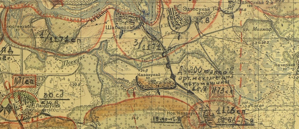 Фрагмент километровой карты РККА 1940 года. Аул Казанукай.